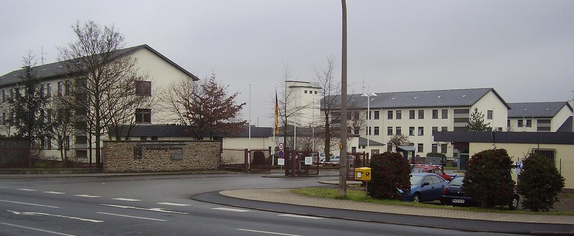 Krahnenberg-Kaserne in Andernach / Germany)